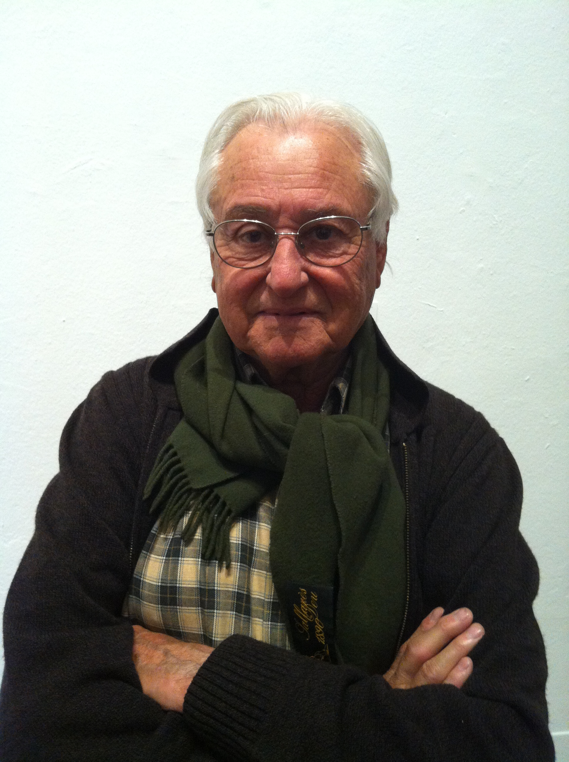 Alfons Borrell i Palazón a la Fundació Joan Miró